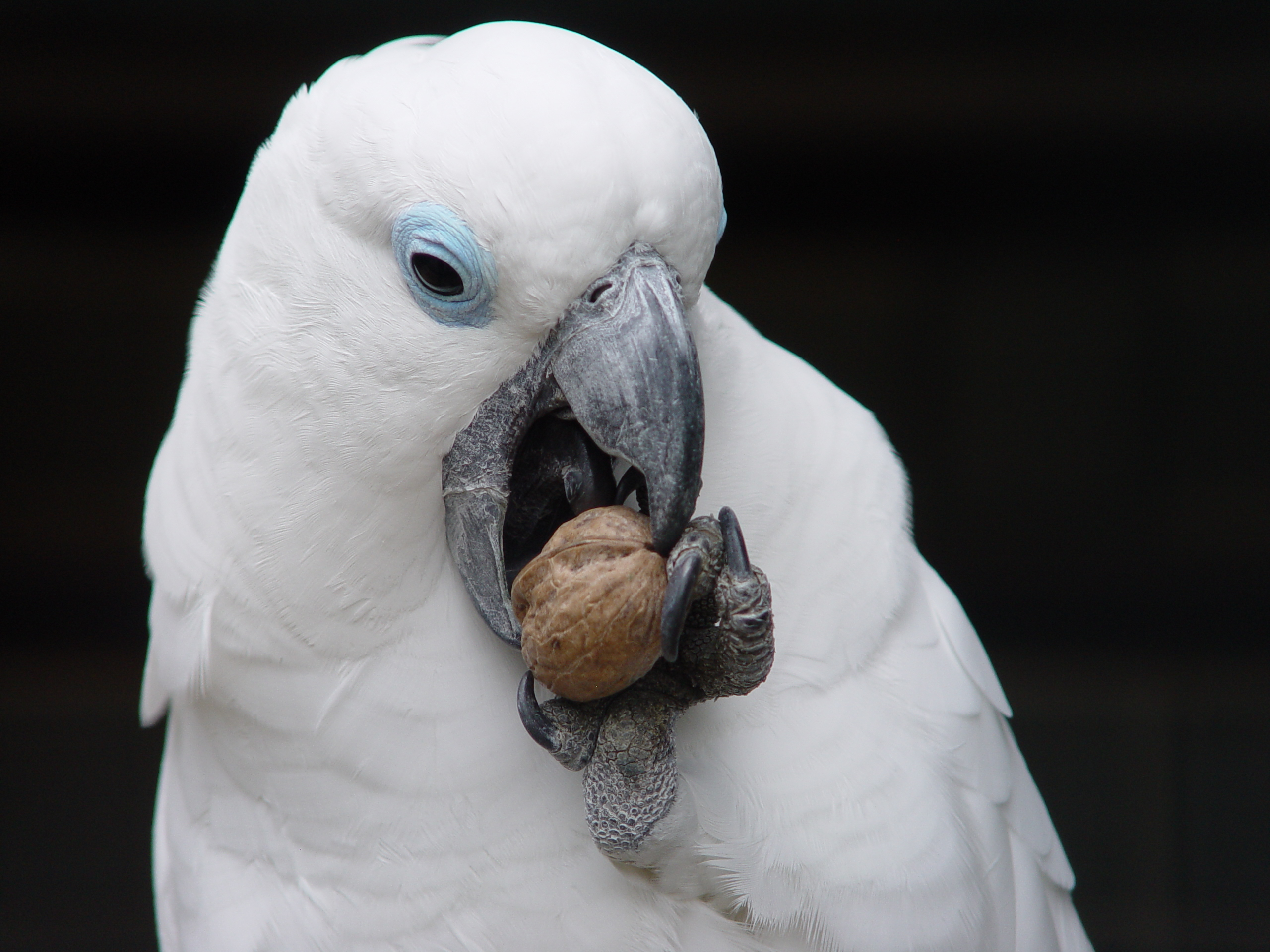 Brillenkakadu (Cacatua ophthalmica)